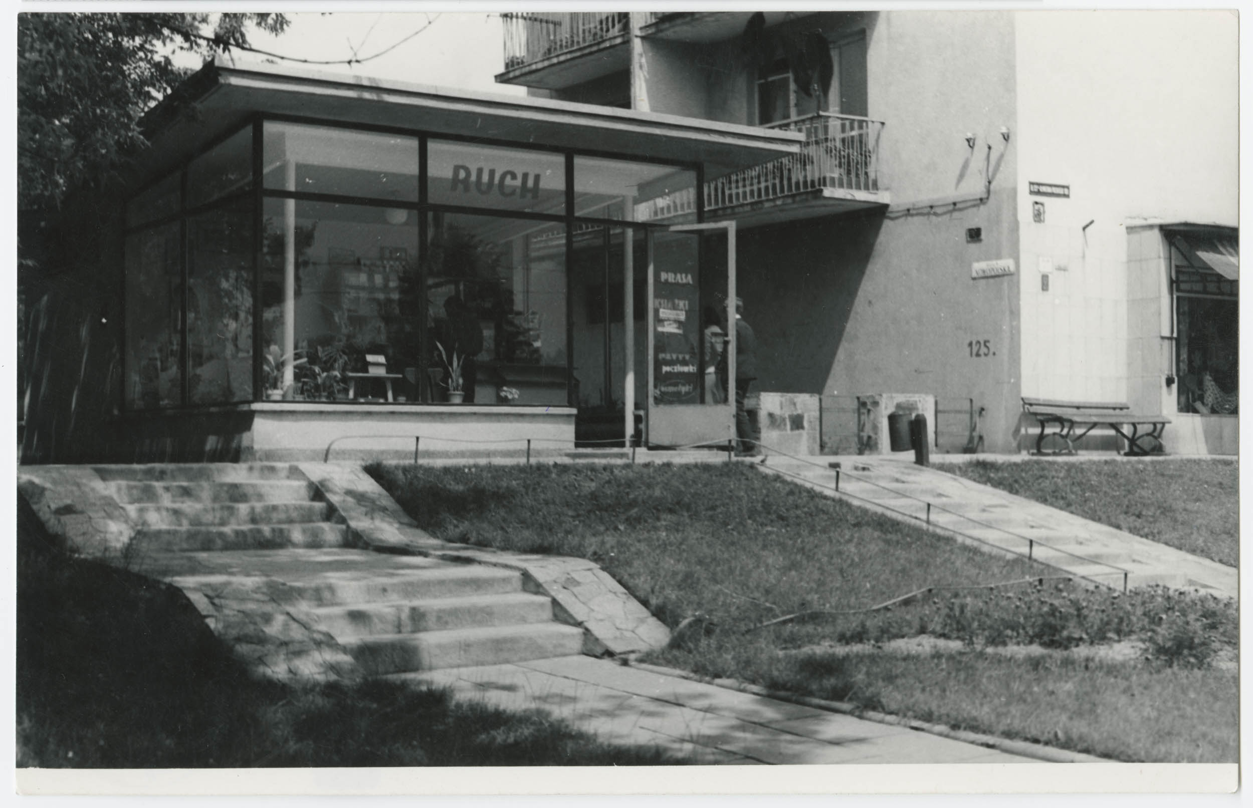 Fotografia Ignacego Płażewskiego, na której widać kiosk „Ruchu”, usytuowany obok bloku z wielkiej płyty. Kiosk znajduje się przy ulicy Nowopolskiej w pobliżu ulicy Wojska Polskiego 150, obecnie mieści się w nim sklep warzywno-spożywczy.